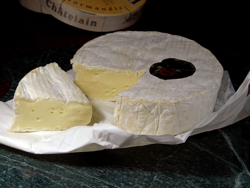 Camembert cheese